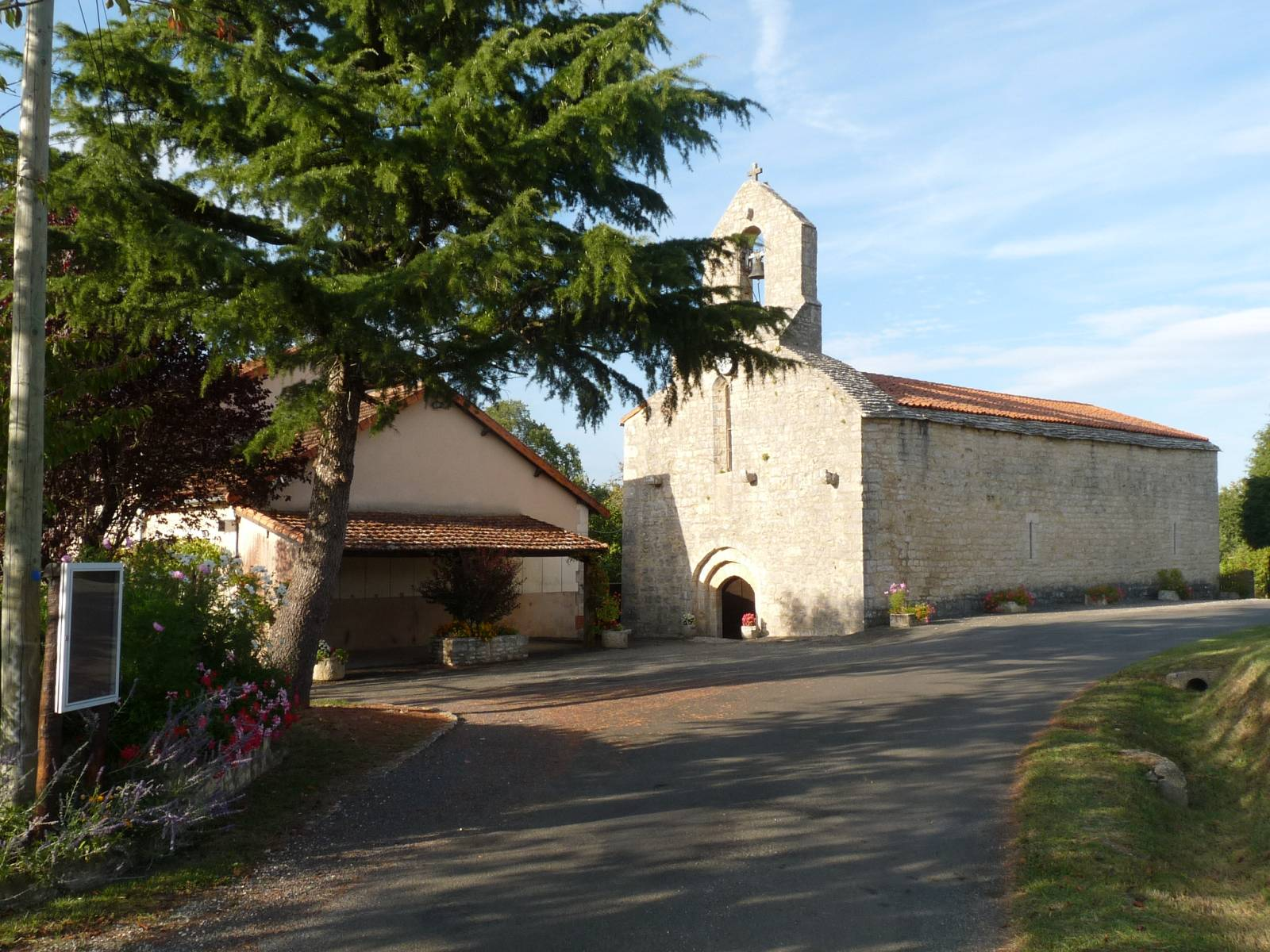 église de St-Sulpice-de-Ruffec, Charente, France